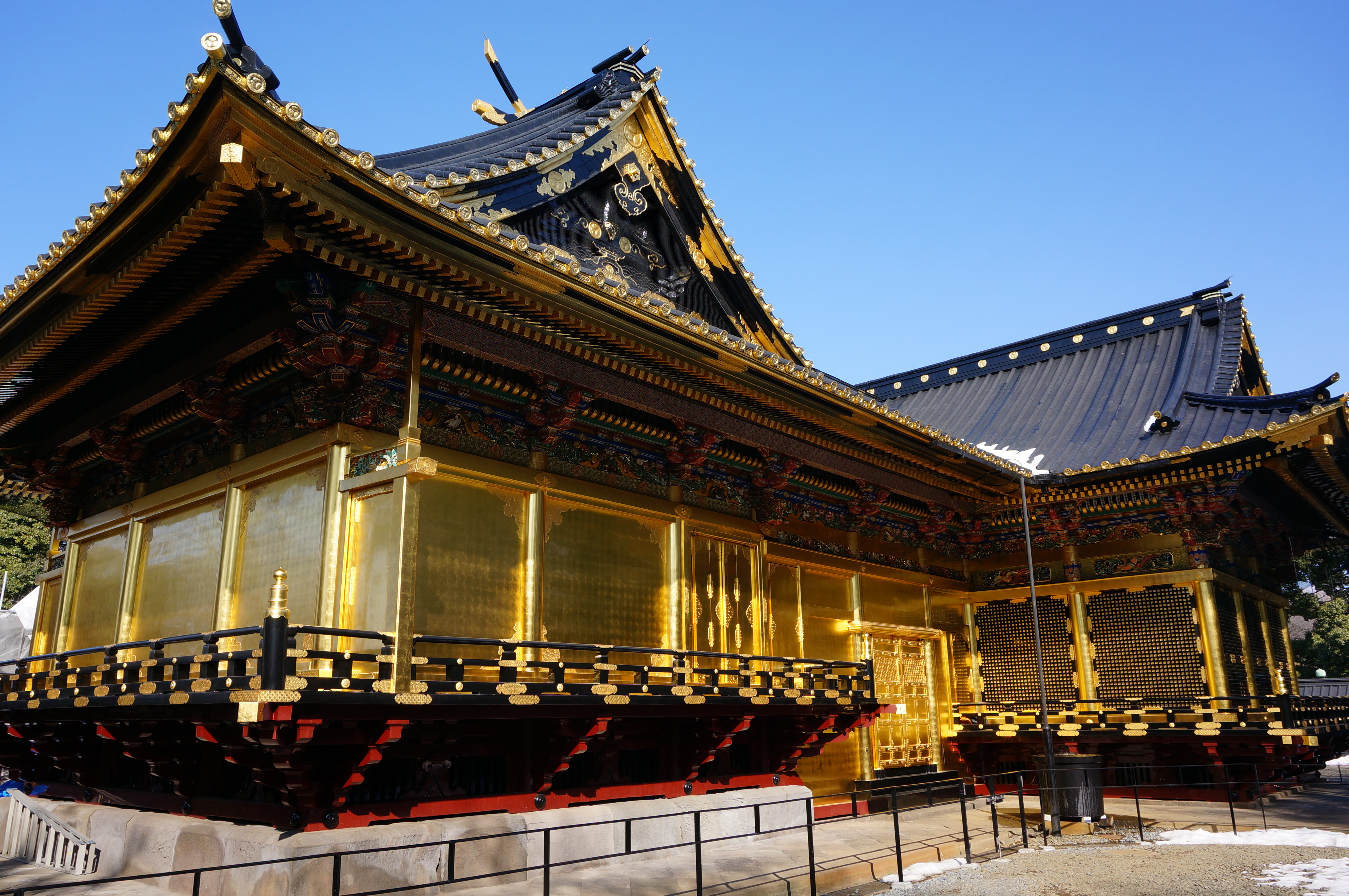 横から見た上野東照宮本殿。